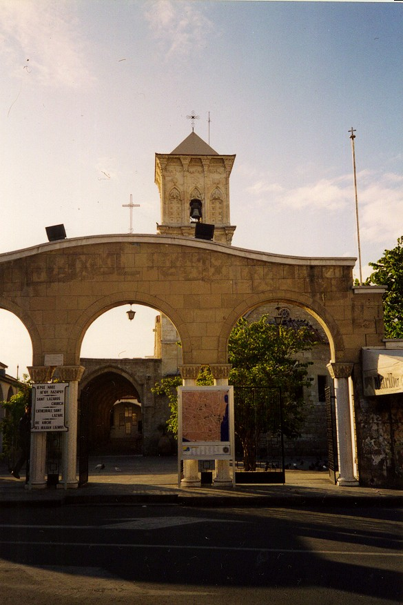 Frente de la Iglesia de San Lázaro. Lárnaca. Chipre. Imagen tomada por el cargador. Año 1998.